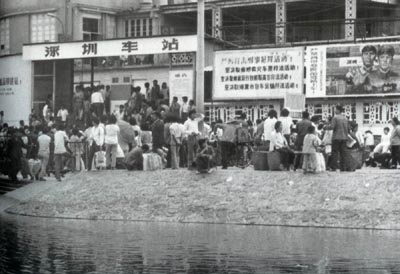 深圳火車站舊貌